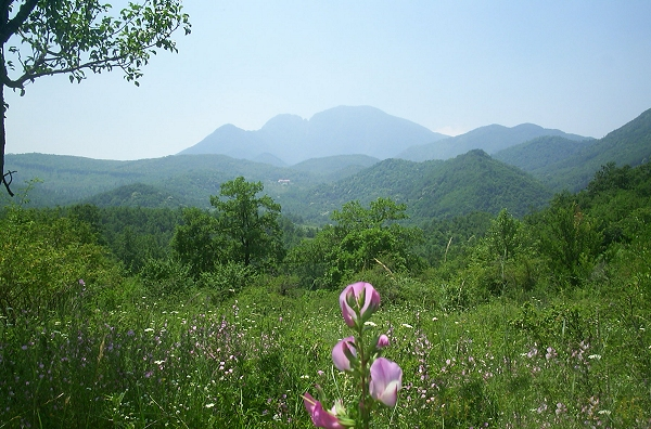 Tipico paesaggio irpino,comune di Montella prov. di Avellino, Italia. Sullo sfondo il monte Acellica 1660 msl circondato dal tipico verde irpino.